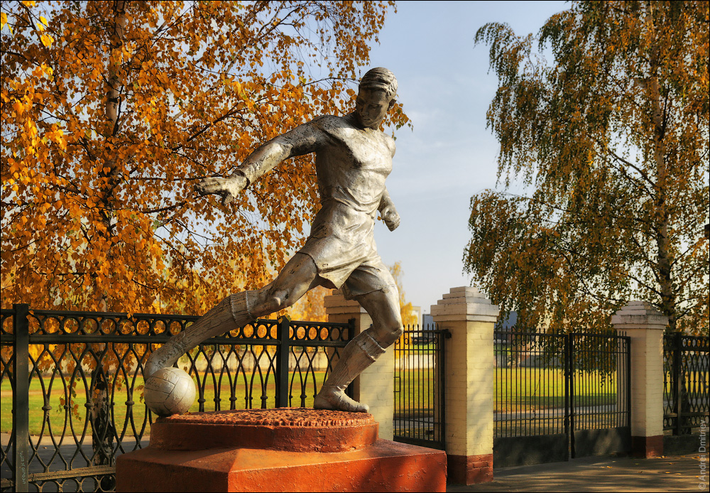 Бабруйскія краявіды